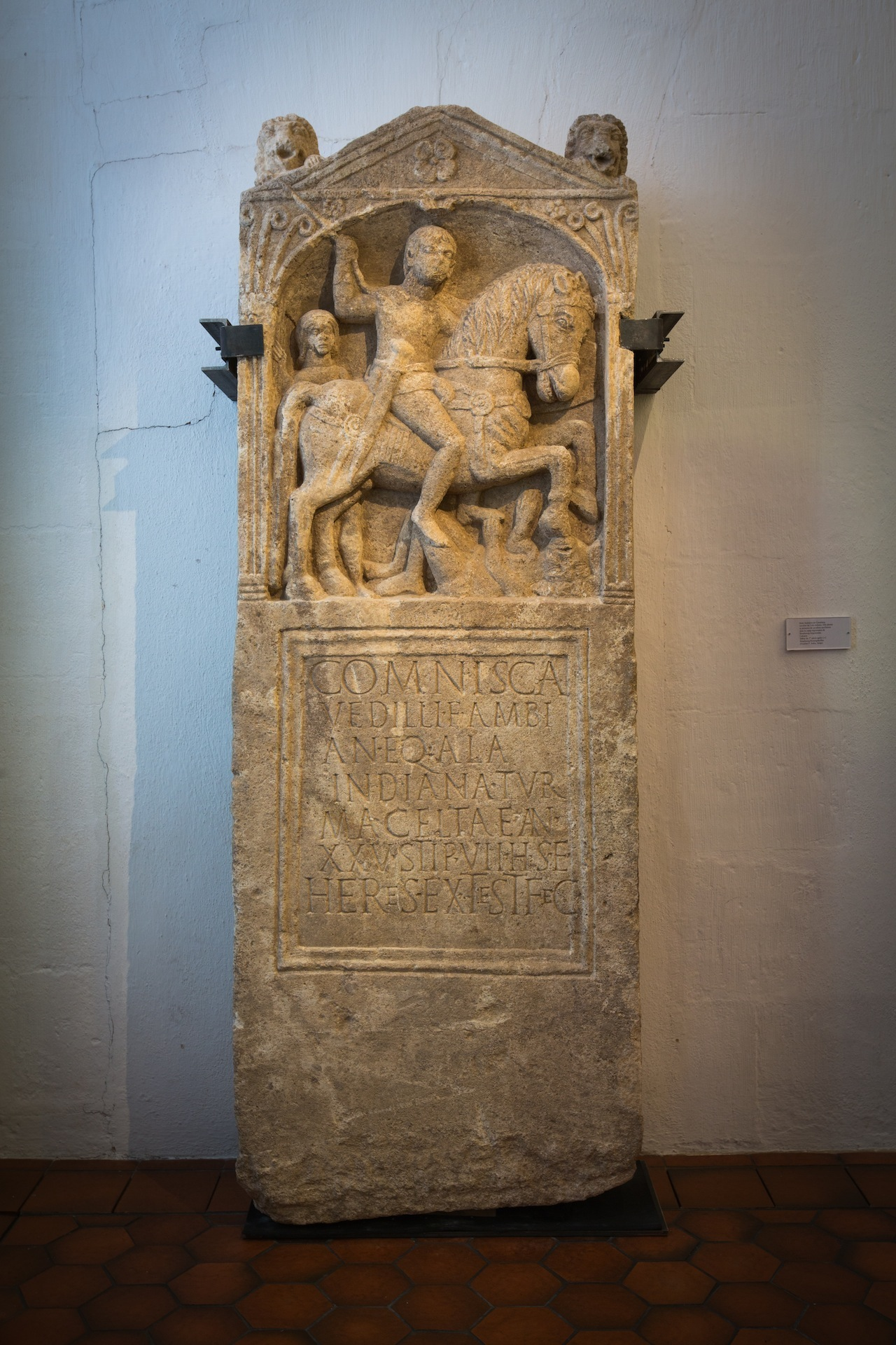 Stèle funéraire Gallo-romaine de Kœnigshoffen